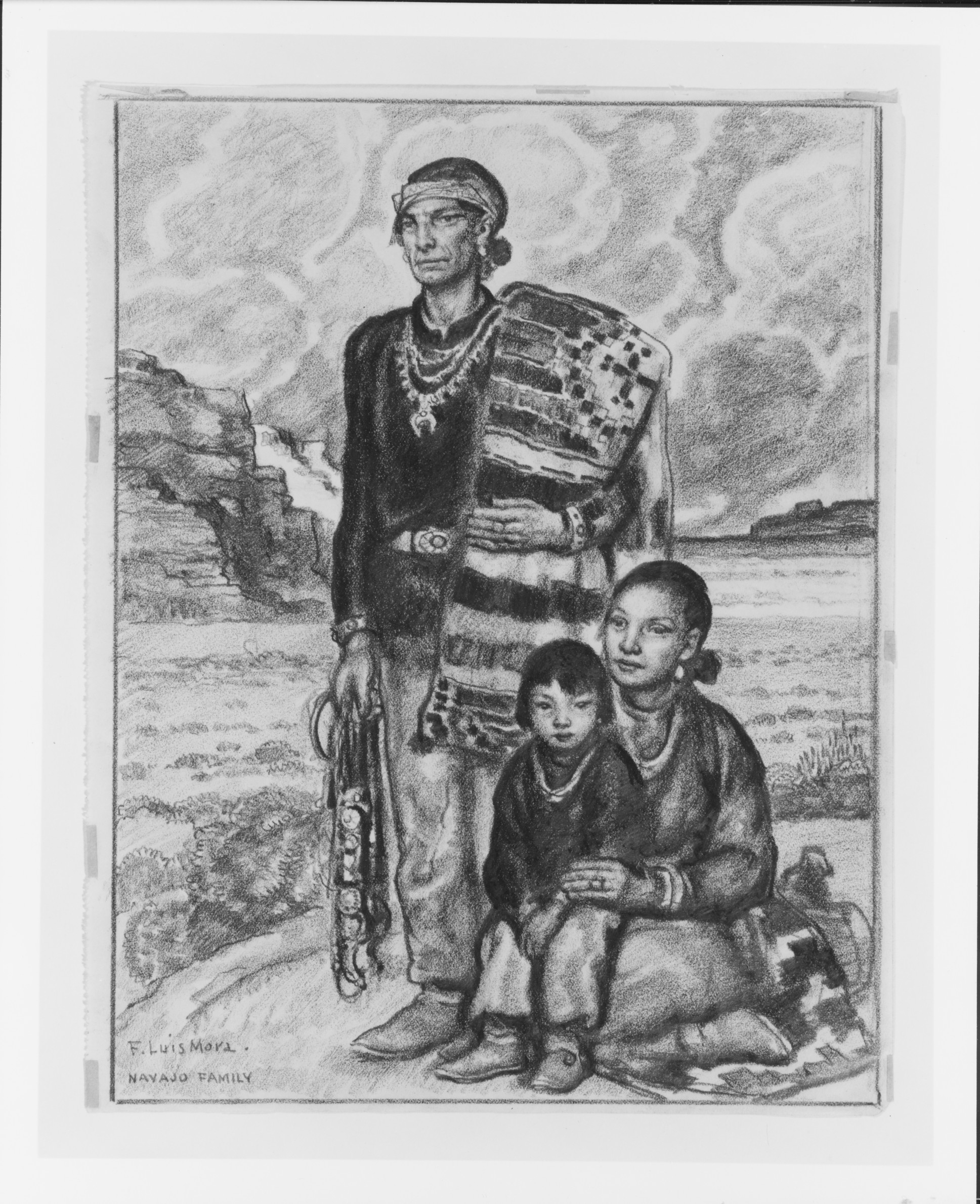 Drawing; Drawings